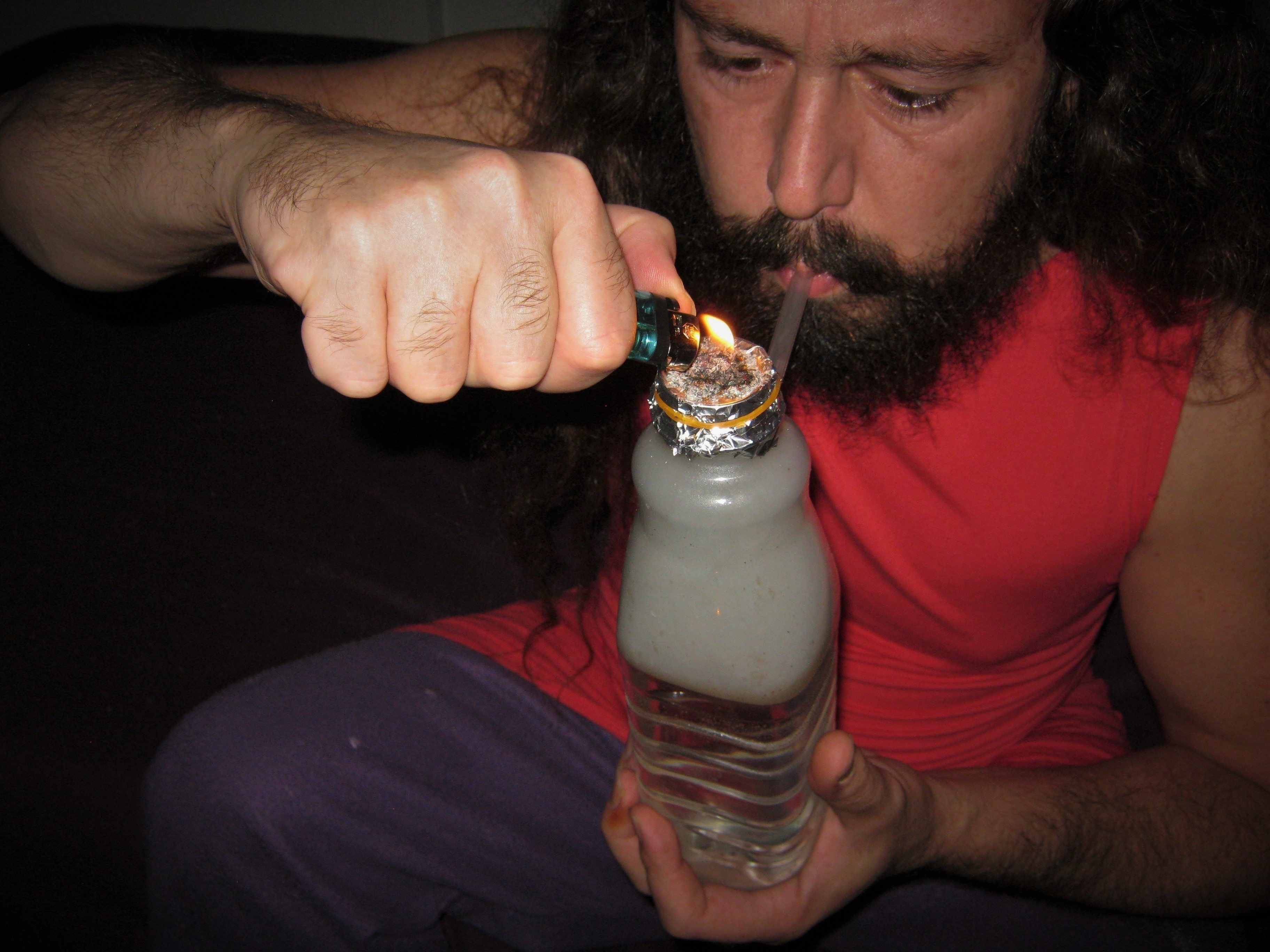 Junkie fumant du crack